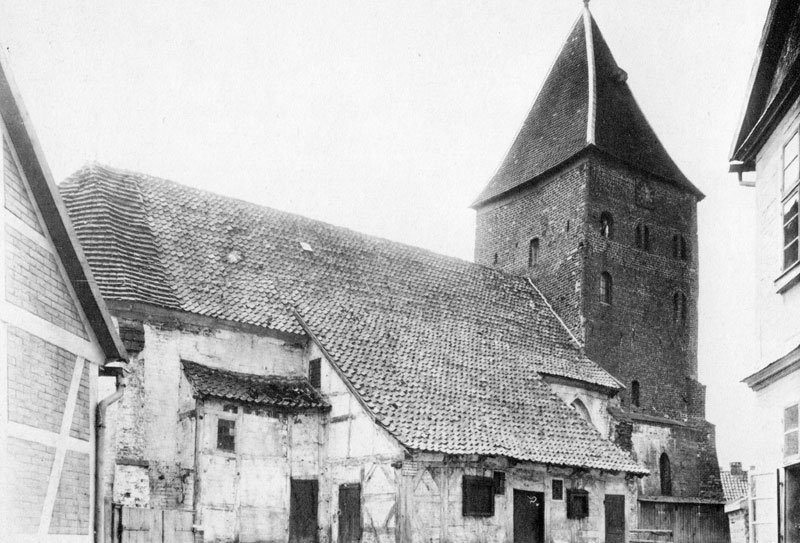 Alte St.-Johannis-Kirche in Dahlenburg